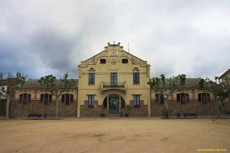 Ajuntament de l'Ametlla del Vallès (Vallès Oriental-Catalunya), obra de Manuel Raspall de 1911.